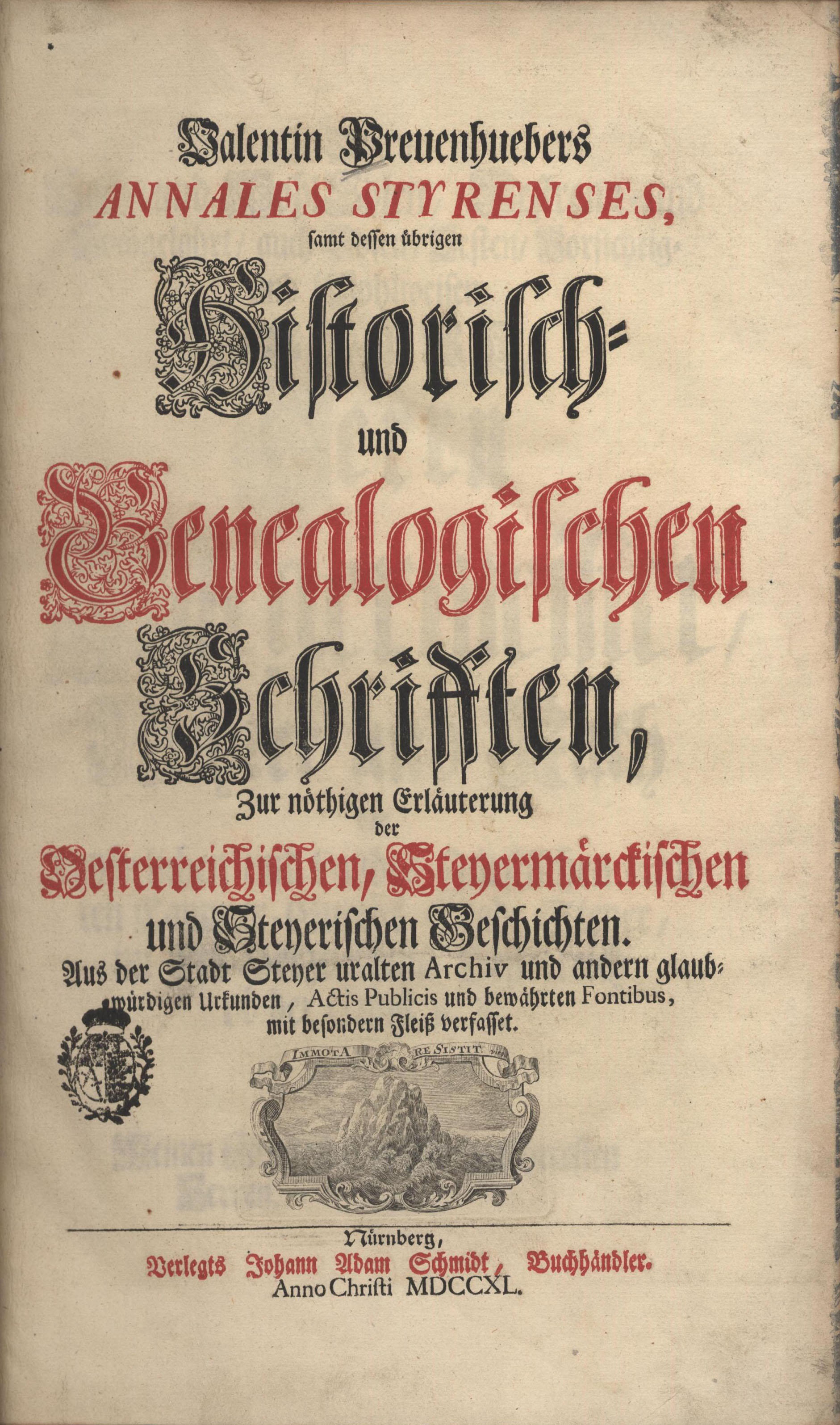 Titelseite von Valentin Preuenhuebers Annales Styrenses, erschienen 1740 in Nürnberg bei Johann Adam Schmidt